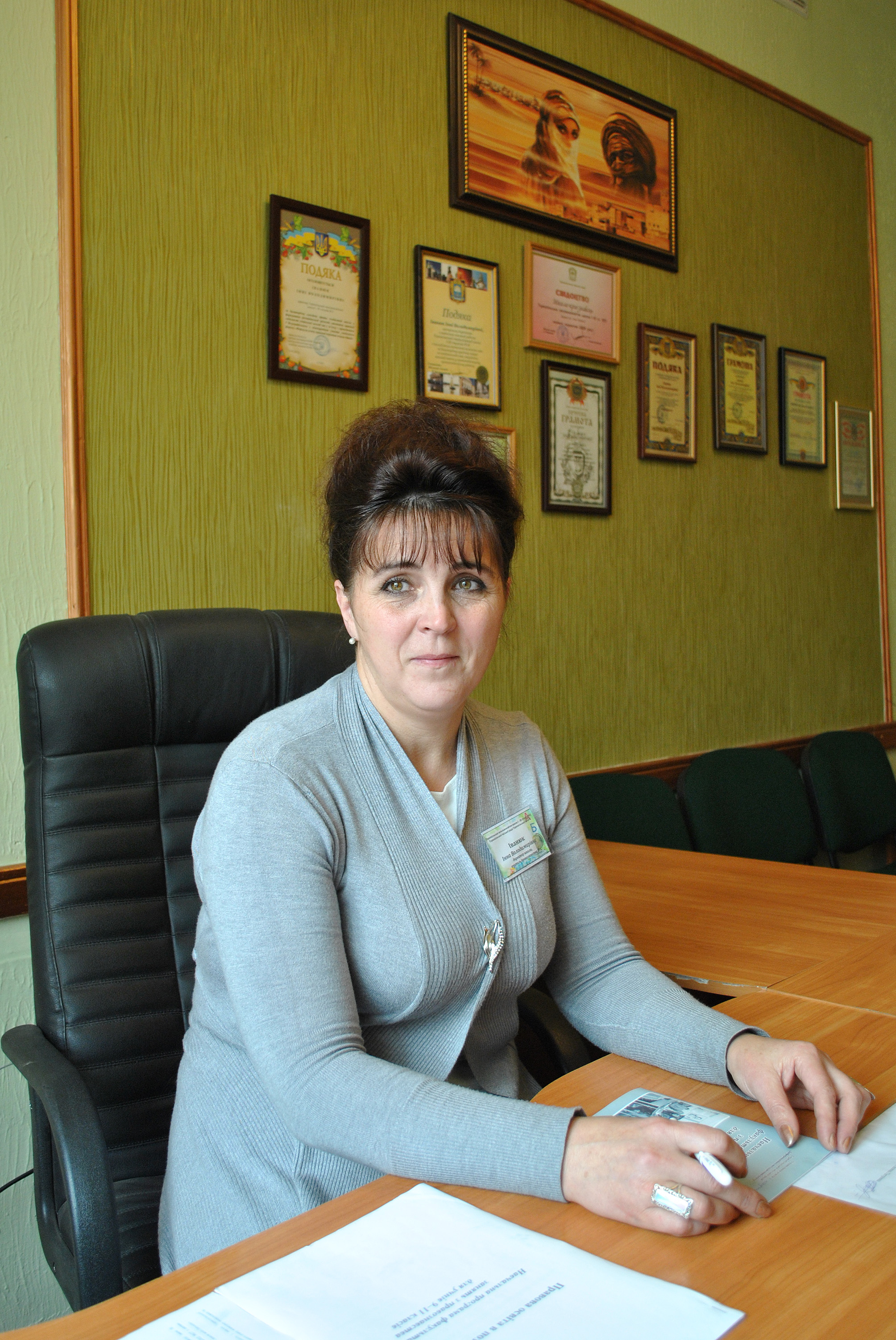 Директор Тернопільської загальноосвітньої школи-правового ліцею № 2 Інна Іванюк.